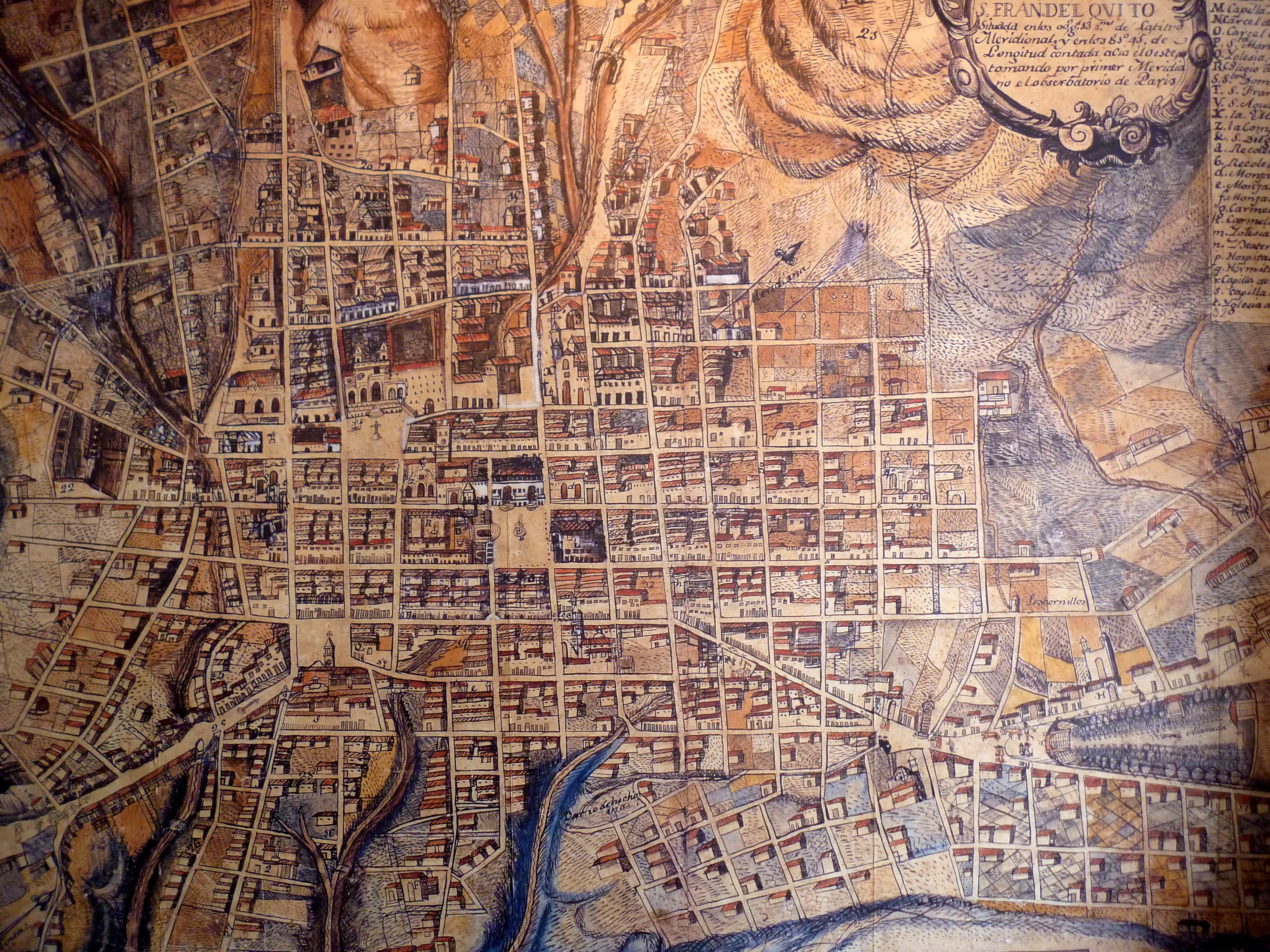 Plano de la ciudad de Quito hacia el año 1805. Atribuído a Juan Pío Montúfar, II Marqués de Selva Alegre y Presidente de la Junta Soberana de Quito de 1809.